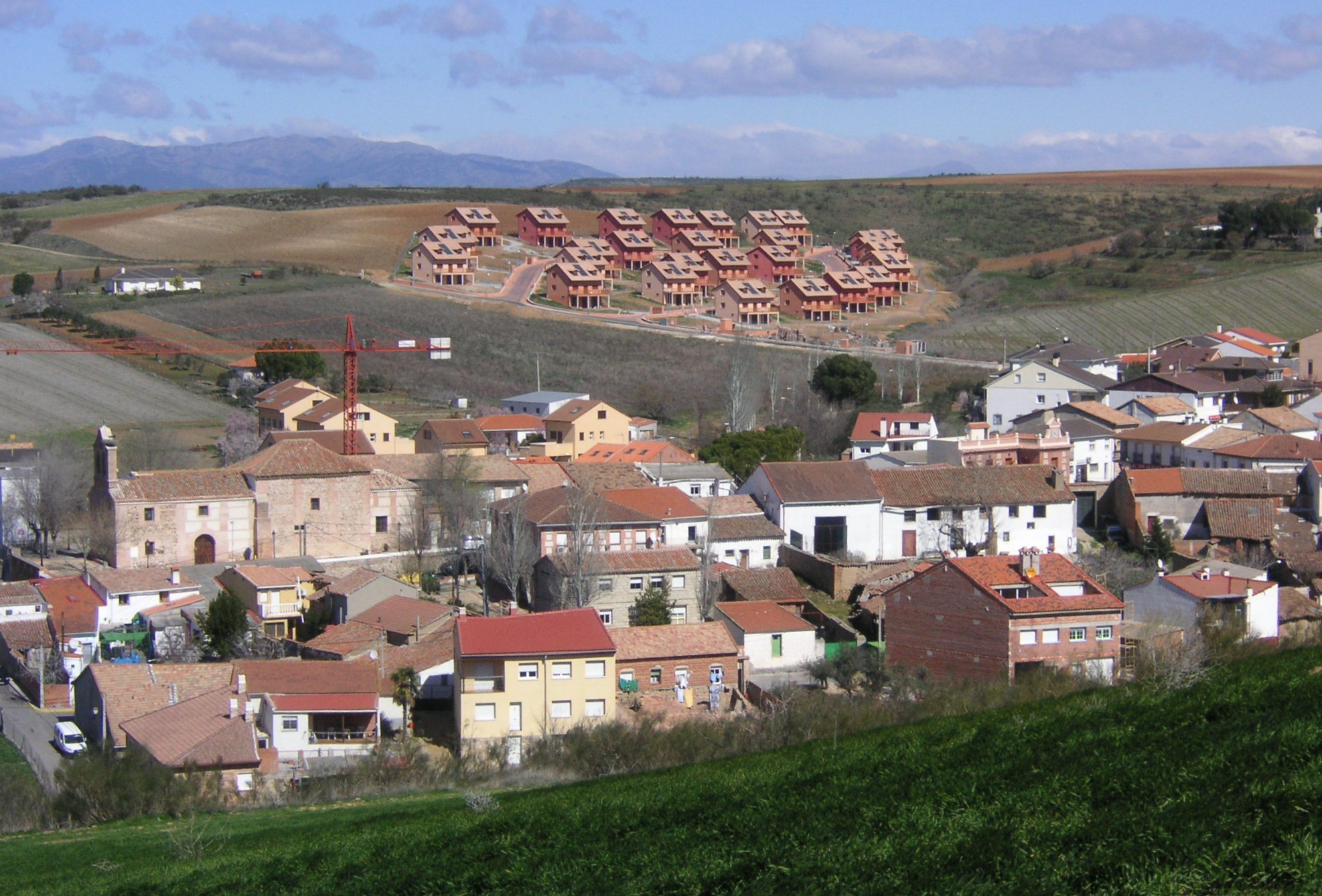 Vista general de Valdepiélagos